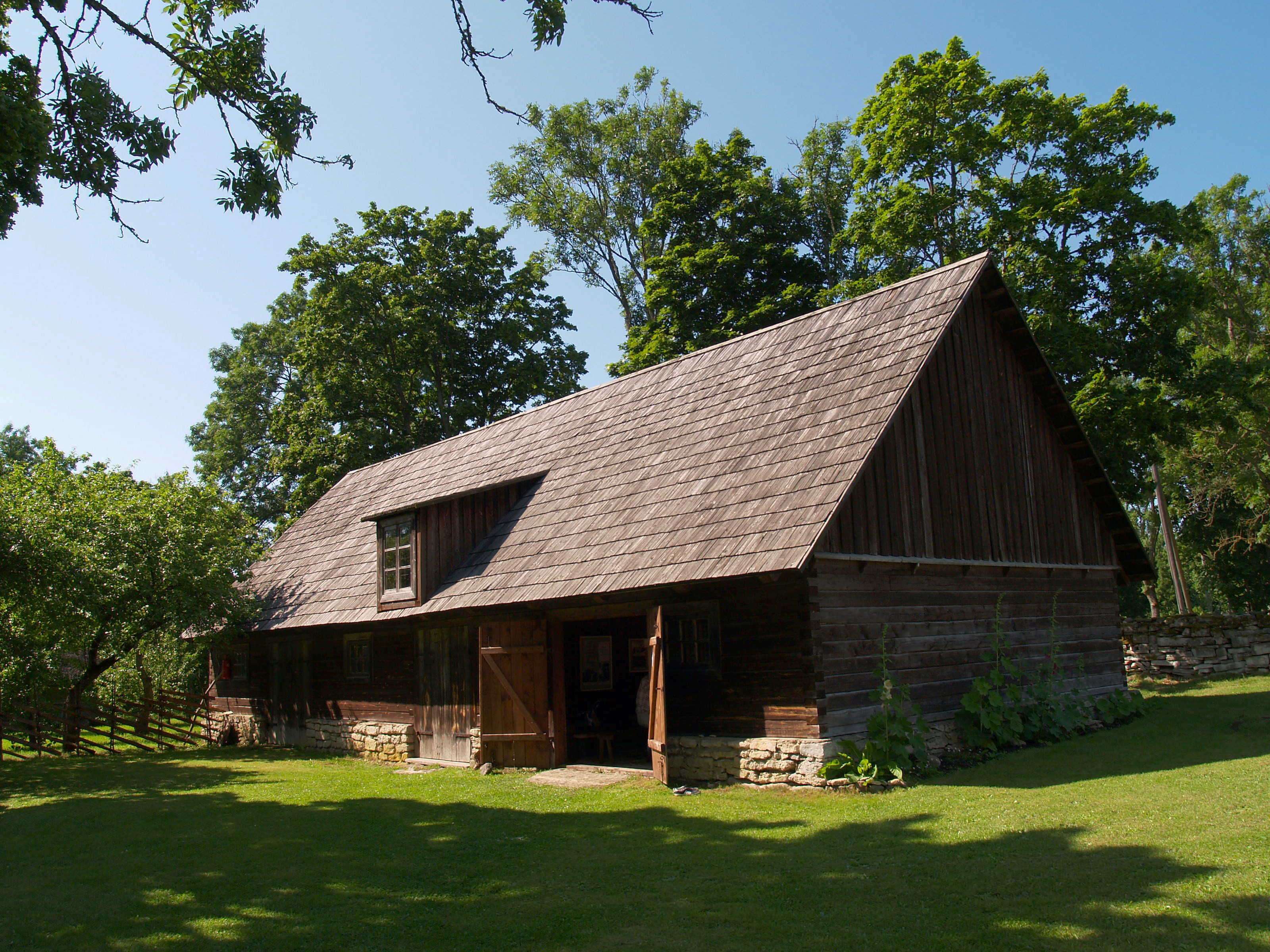 Mihkli talu laut